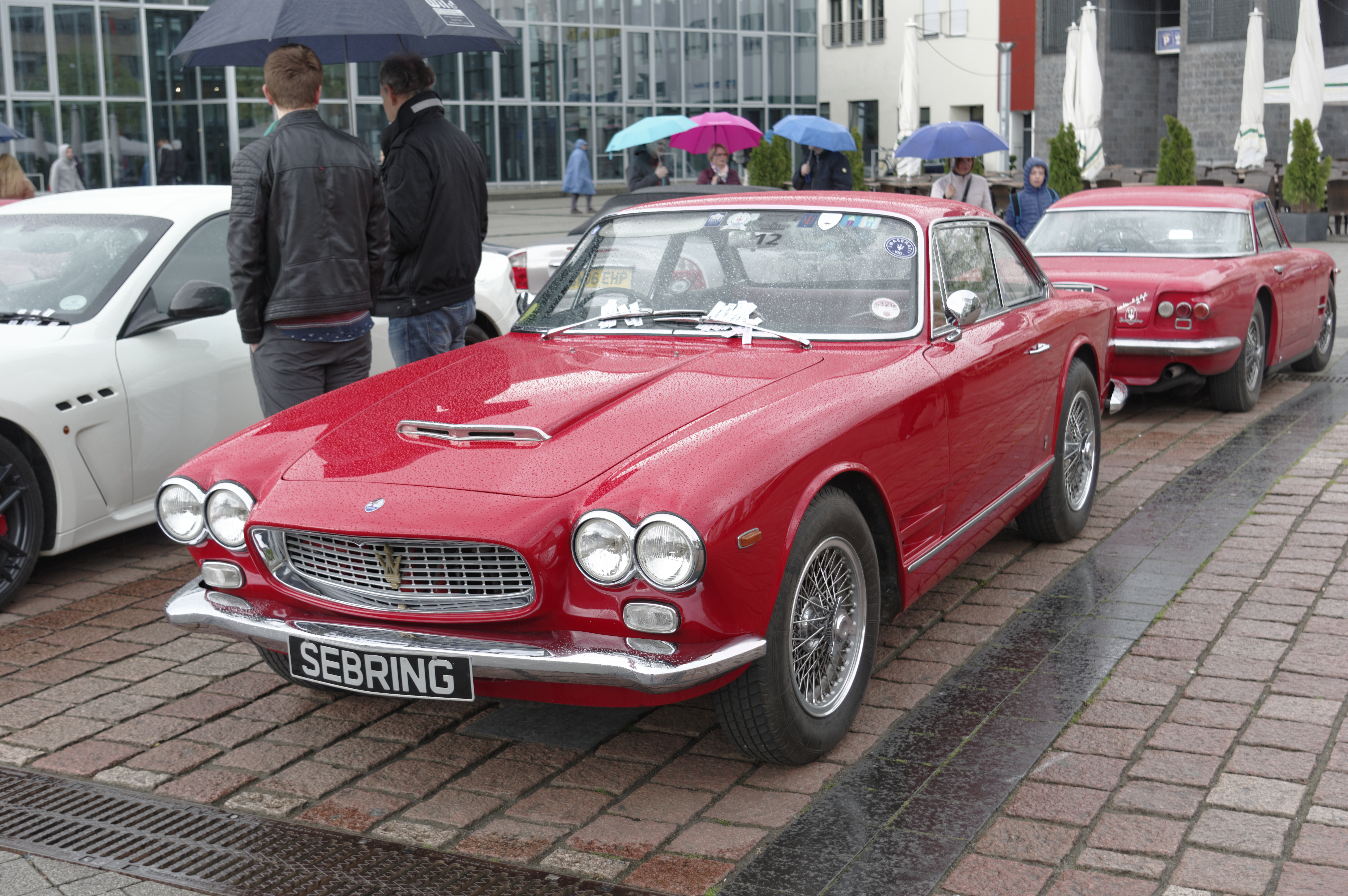 Ausstellung eines britischen Maserati Clubs in Trier